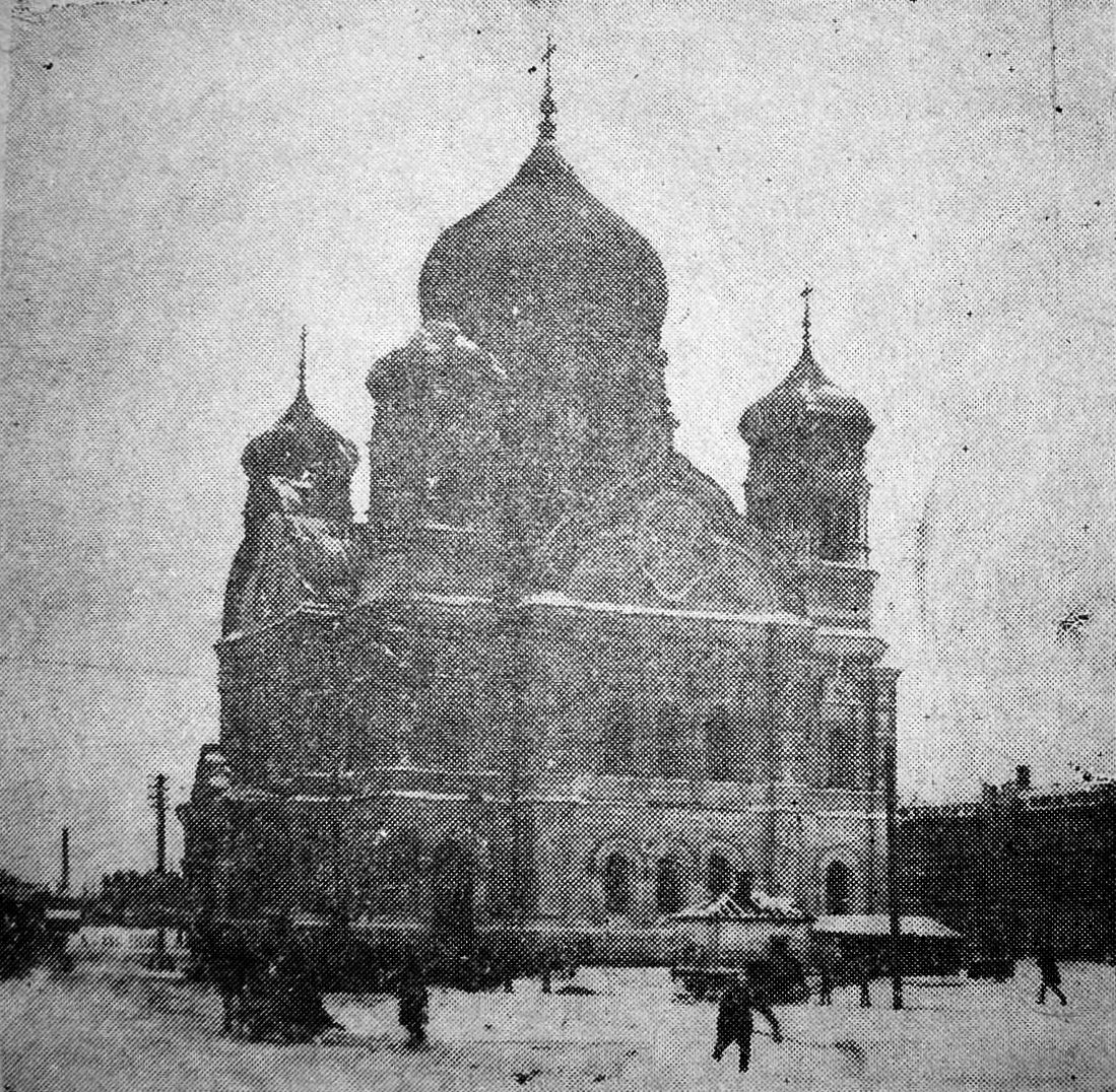 Церковь князя Владимира, которая находилась на Кольцовской улице. Храм был разрушен согласно постановлению секретариата облисполкома (10 мая 1931 года).